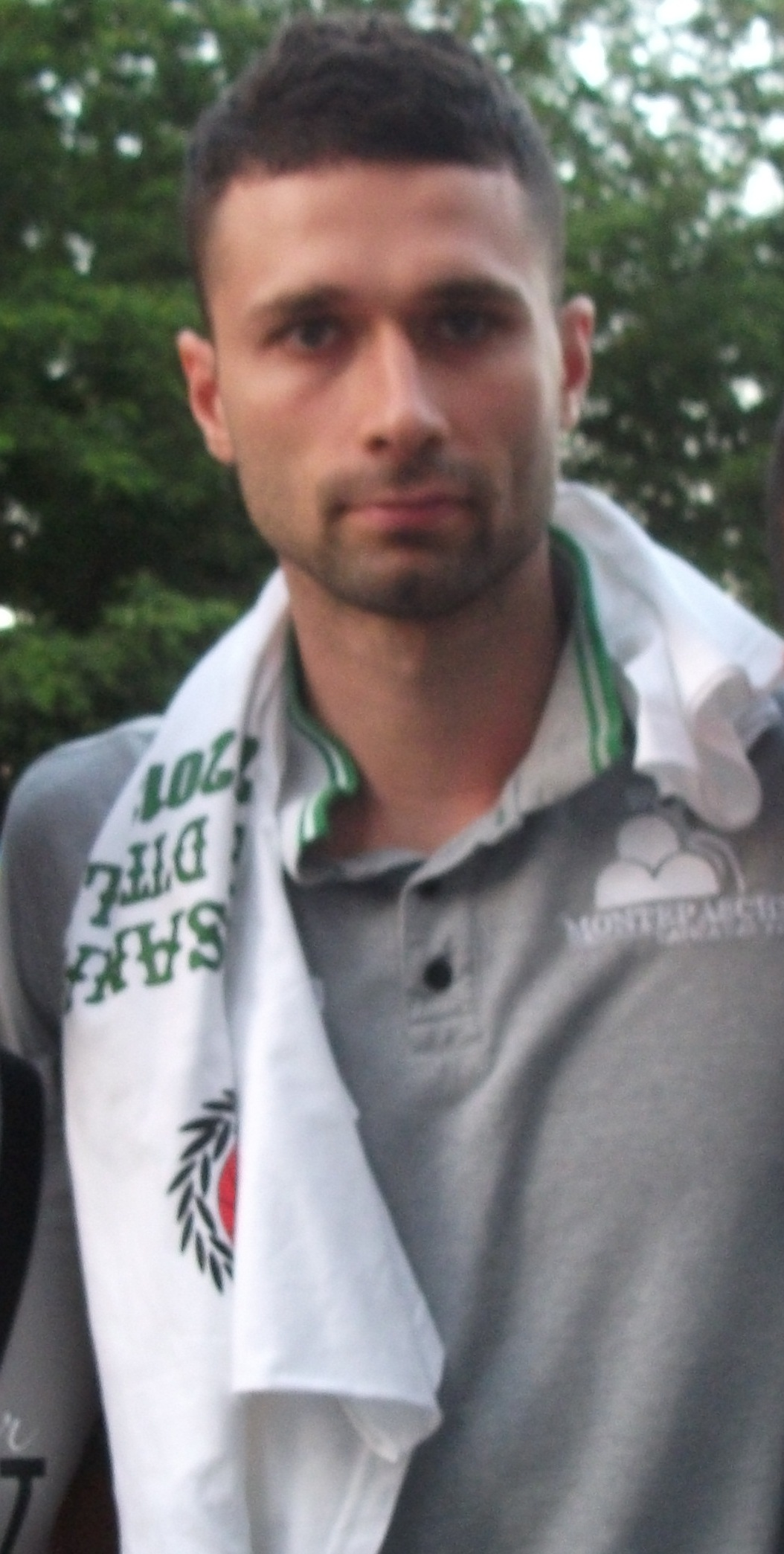 Aleksandar Rašić durante i festeggiamenti del 21 giugno 2013 per lo scudetto 2012/13 vinto della Mens Sana Basket.